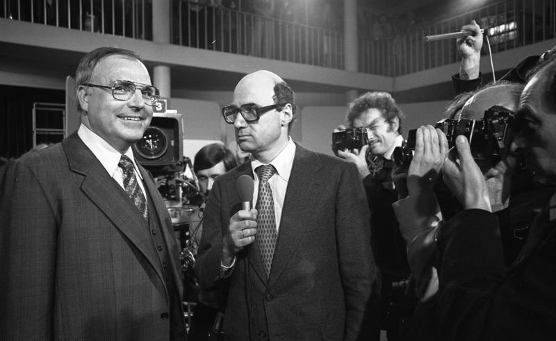 Bundestagswahl - Wahlnacht im Bundeshaus CDU-Kanzlerkanditat Helmut Kohl gibt Interview dem österreichischen Fernsehjournalisten Emmerich